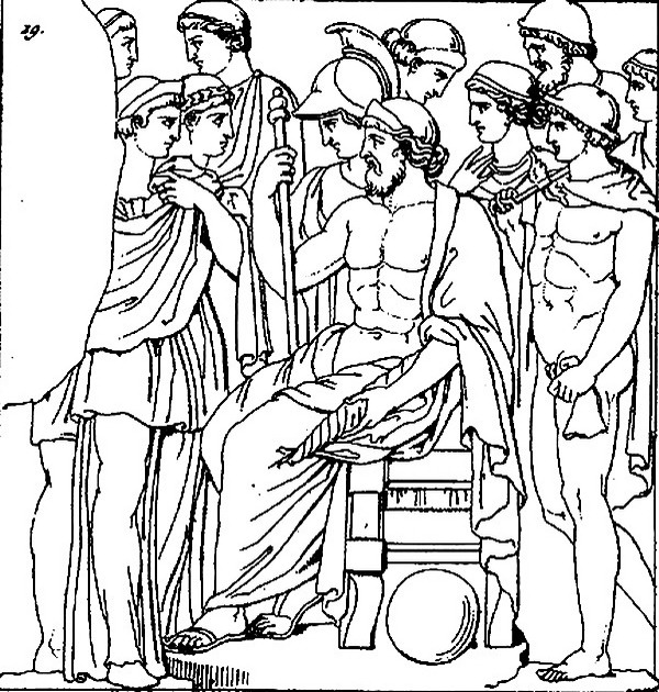 Zeus recevant l'hommage des dieux de l'Olympe (dessin d'un bas-relief d'autel)